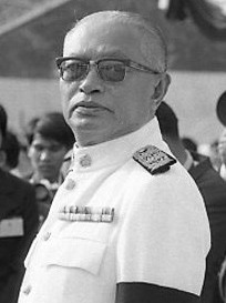 Thai Prime Minister Sanya Dharmasakti in October 1974, by Norman Peagam